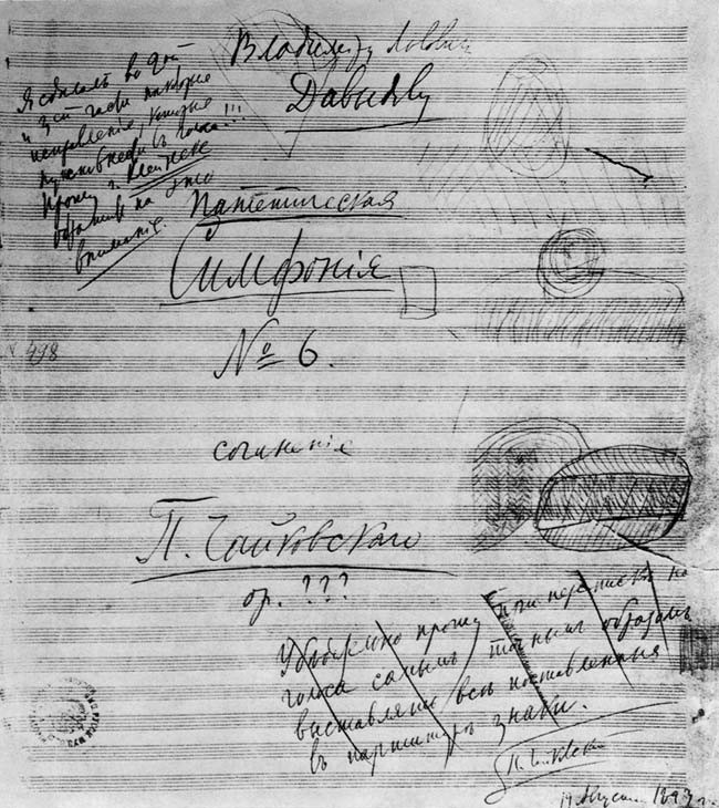 Титульный лист рукописи Шестой симфонии с посвящением Владимиру Давыдову